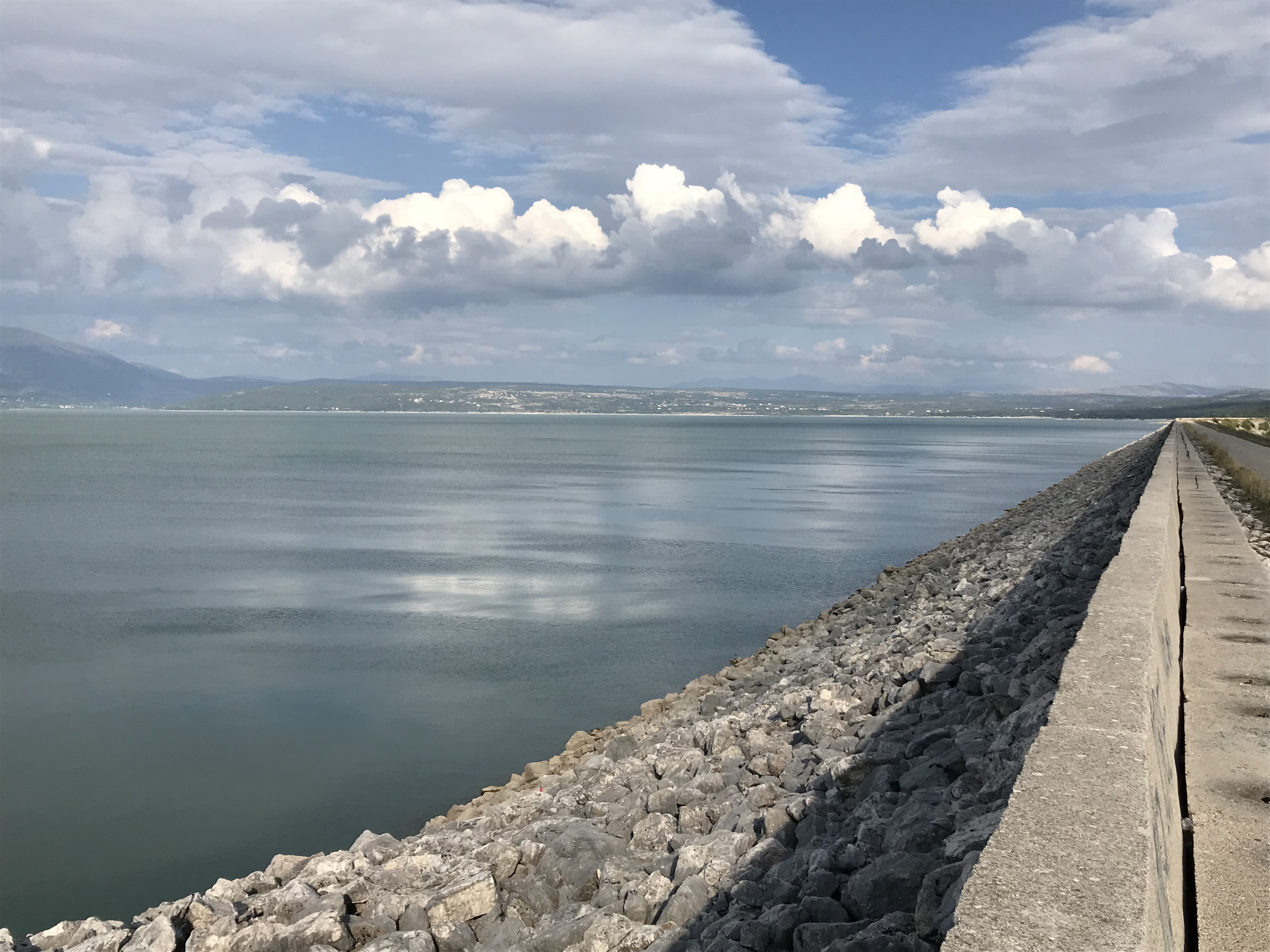 Jezero Buško v Bosně a Hercegovině - hráz.